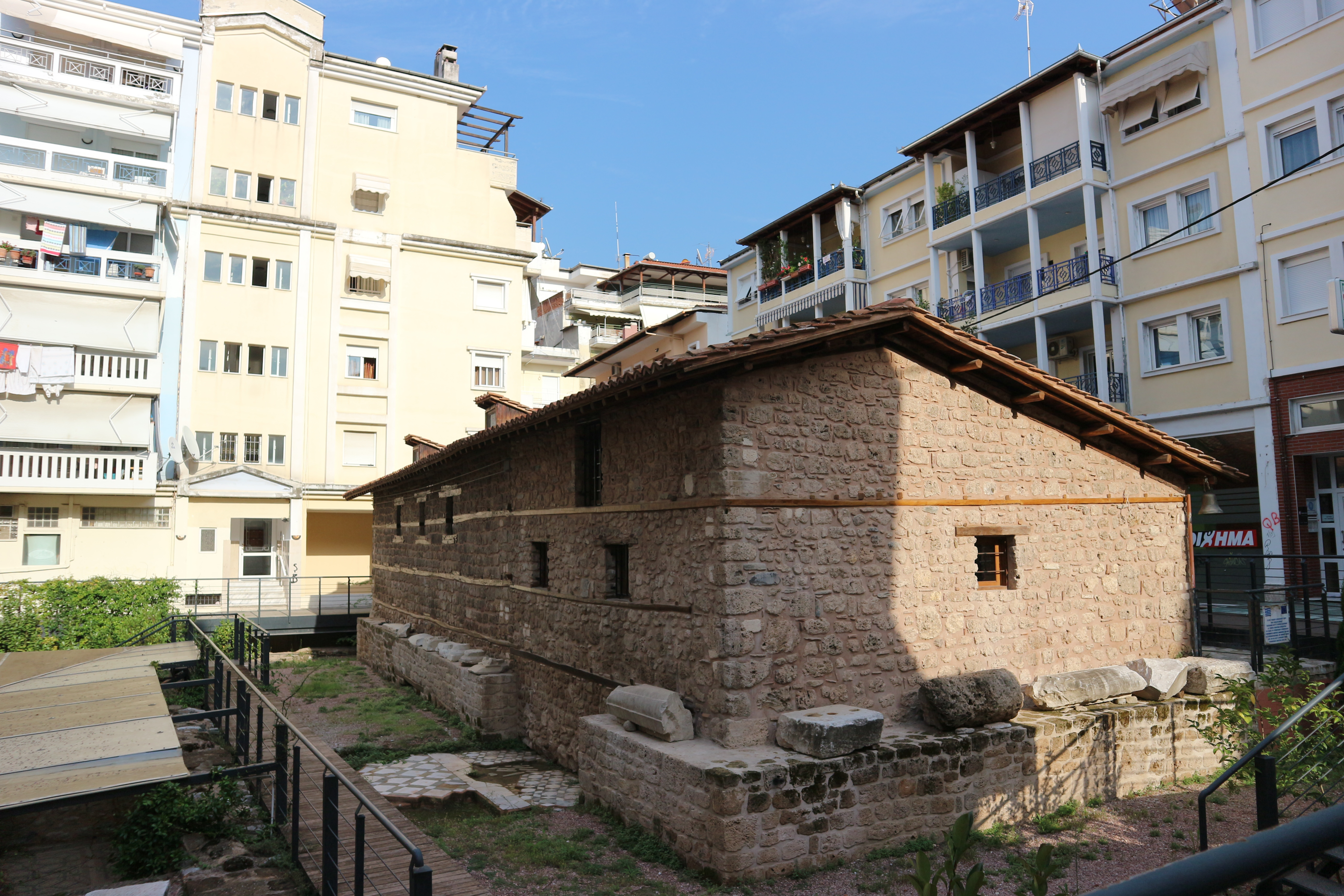 Ο ναός του Αγίου Παταπίου στη Βέροια.«Αρχαιολογικός χώρος Αγίου Παταπίου Βεροίας»